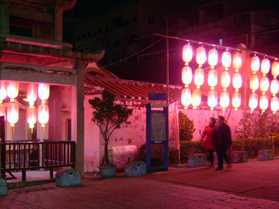 中華民國 102 年 2 月 13 日，五條港元宵節燈會，攝於風神廟側。